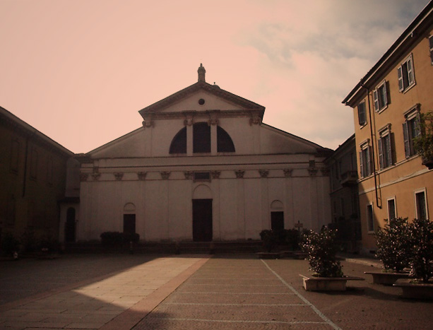 La basilica di San Vittore al Corpo a Milano.